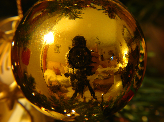 me